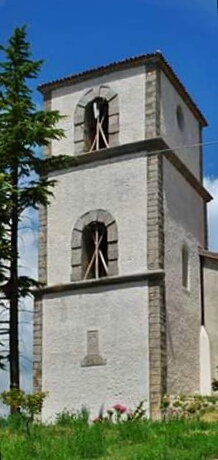 Campanile San Francesco Marsico Nuovo